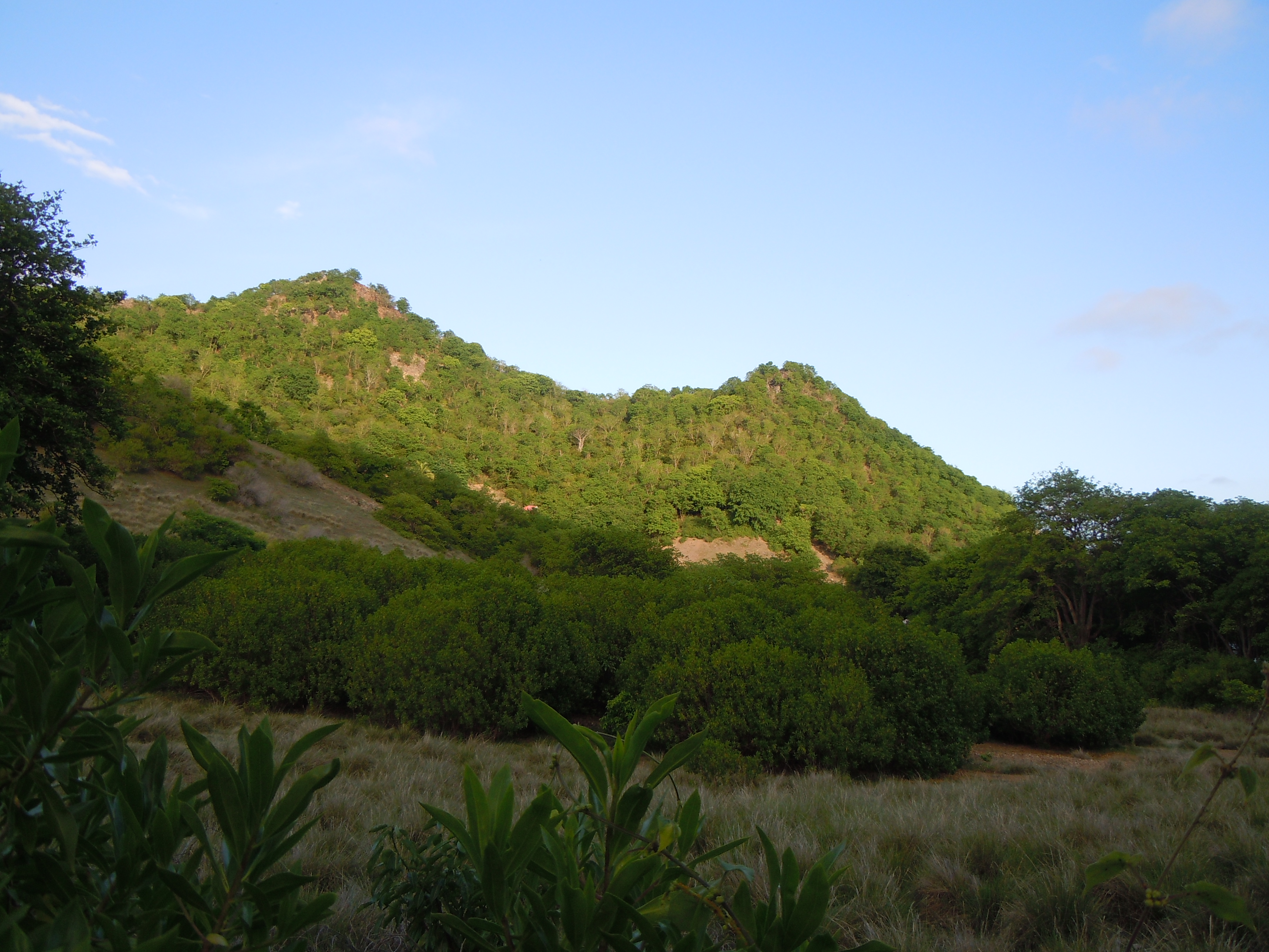 Morne à Craie, Terre-de-Haut